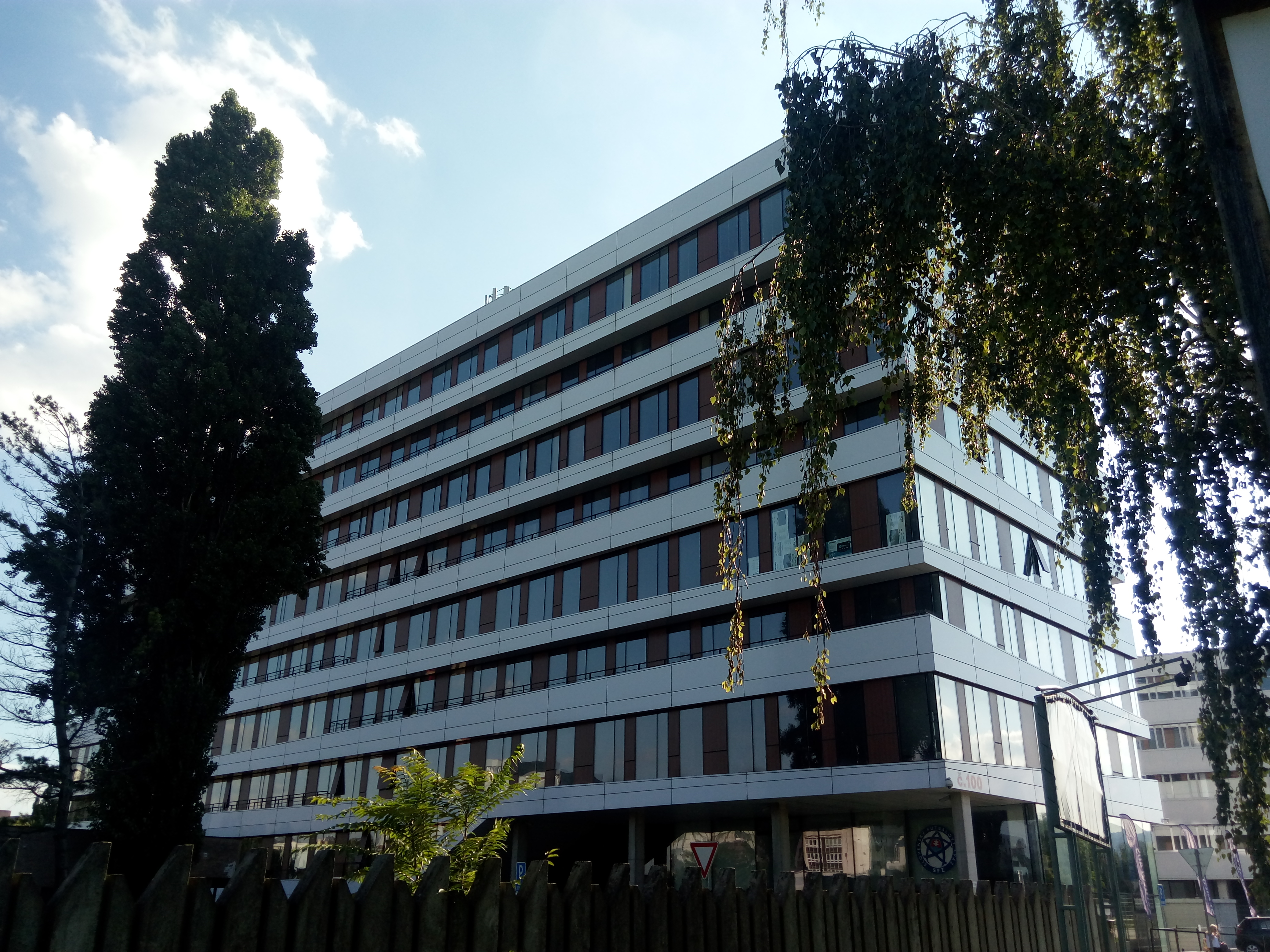 Trnavská cesta 100, Ružinov, Bratislava